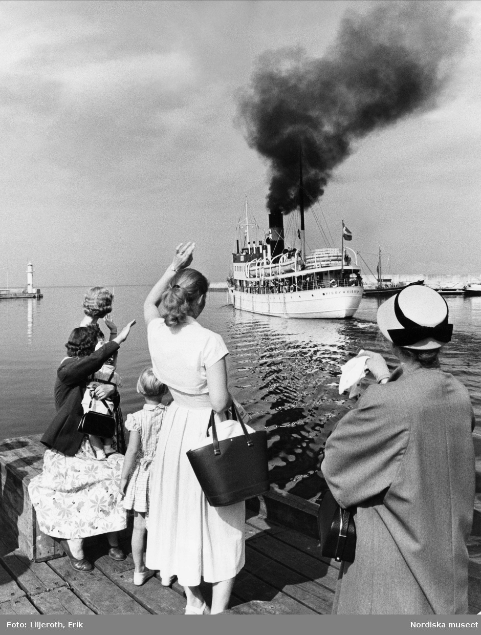 Vinkande kvinnor på brygga i Visby, Gotlandsfärja i bakgrunden